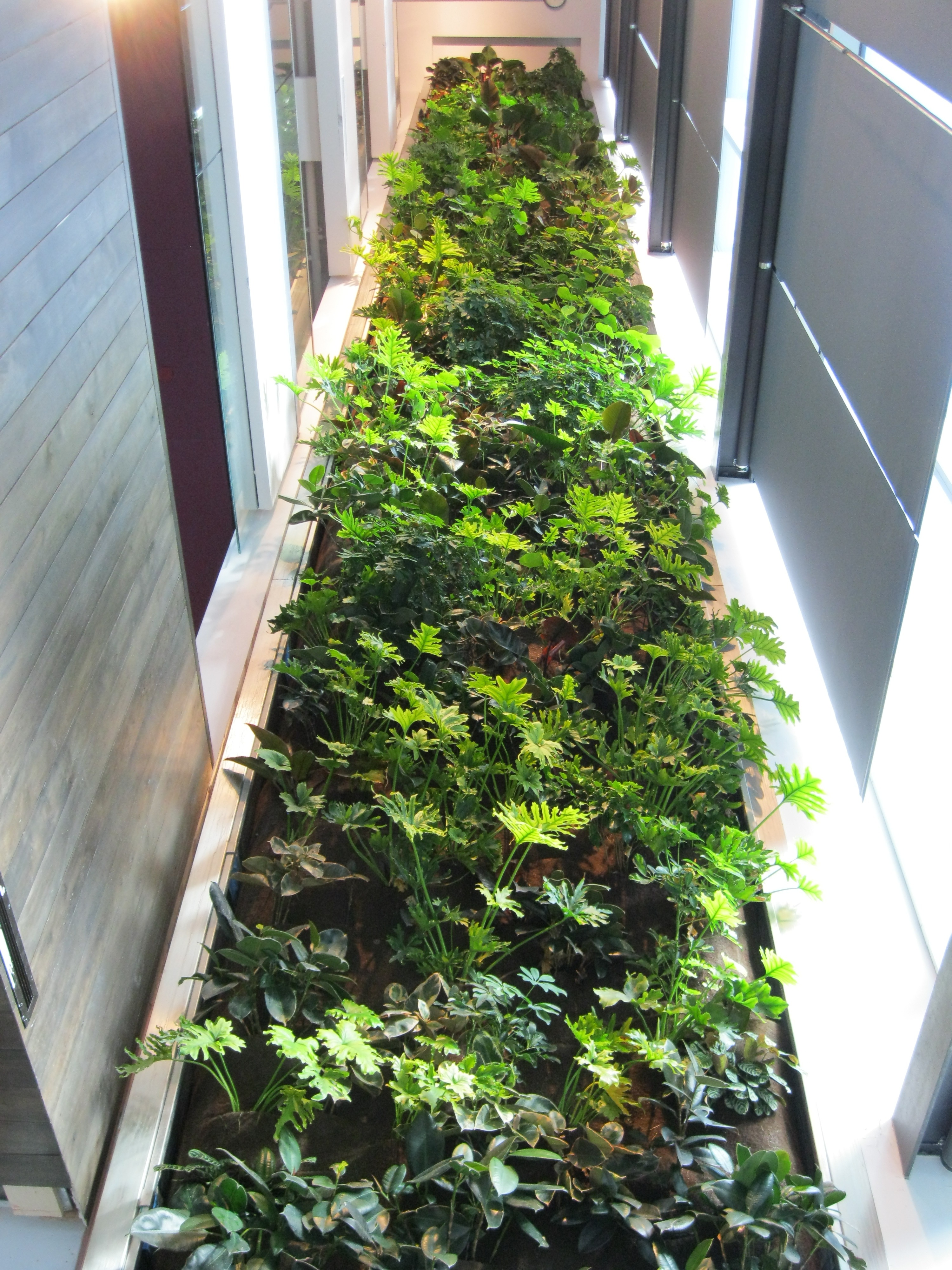 Maison du développement durable, 50 rue Sainte-Catherine Ouest, Montréal